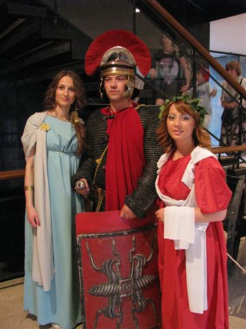 Ноћ музеја - Музеј Војводине; мај 2009.